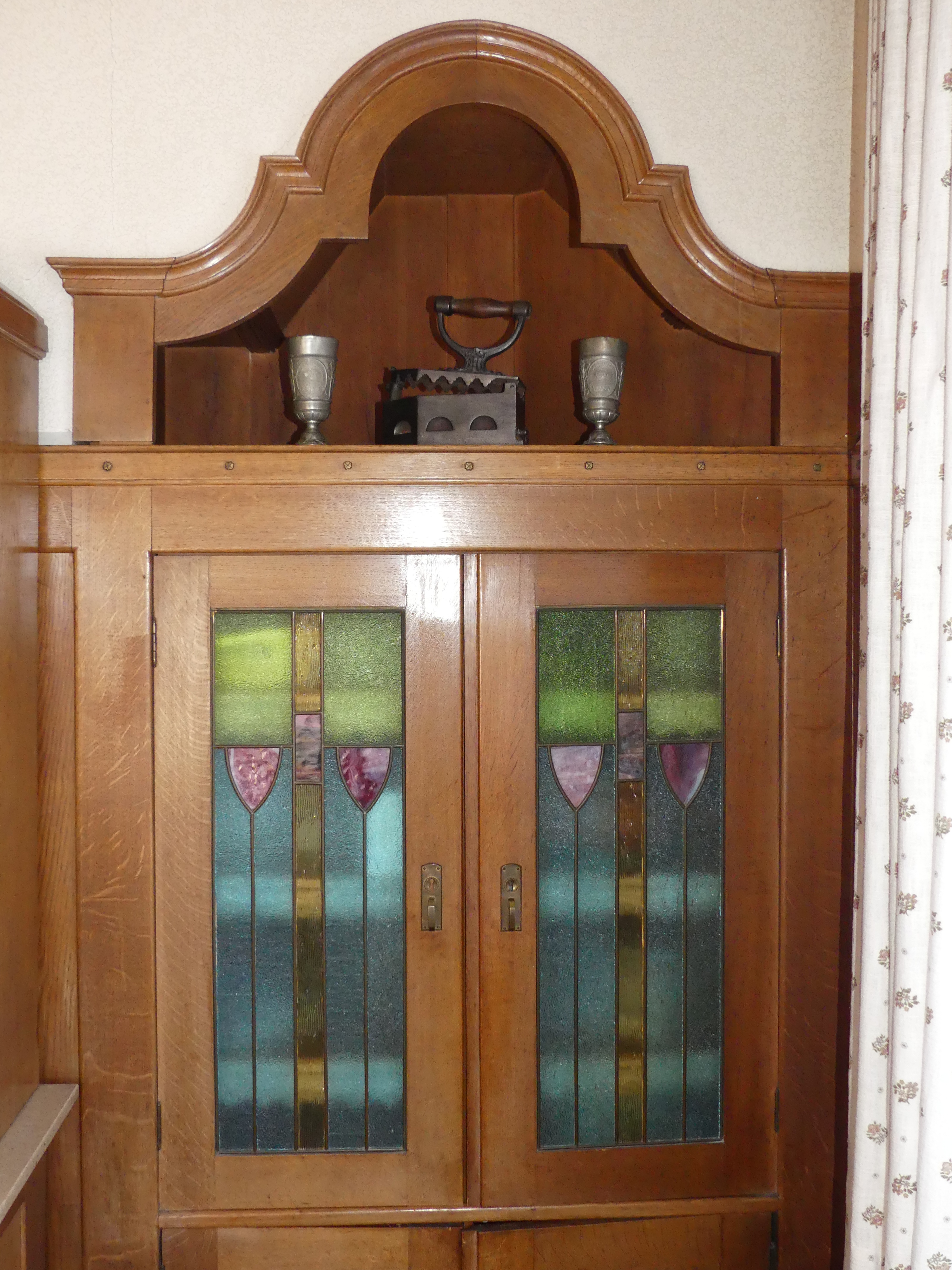 Das Haus Rheinstraße 4 in Lustenau im österreichischen Bundesland Vorarlberg, auch als „Villa Robert Bösch“ bezeichnet, ist ein für die großbürgerliche Bau- und Wohnkultur der Zeit um 1900 charakteristischer Jugendstilbau. Im Erkerzimmer im Erdgeschoß befindet sich ein Kredenzkasten mit Bleiverglasung in den Türen.